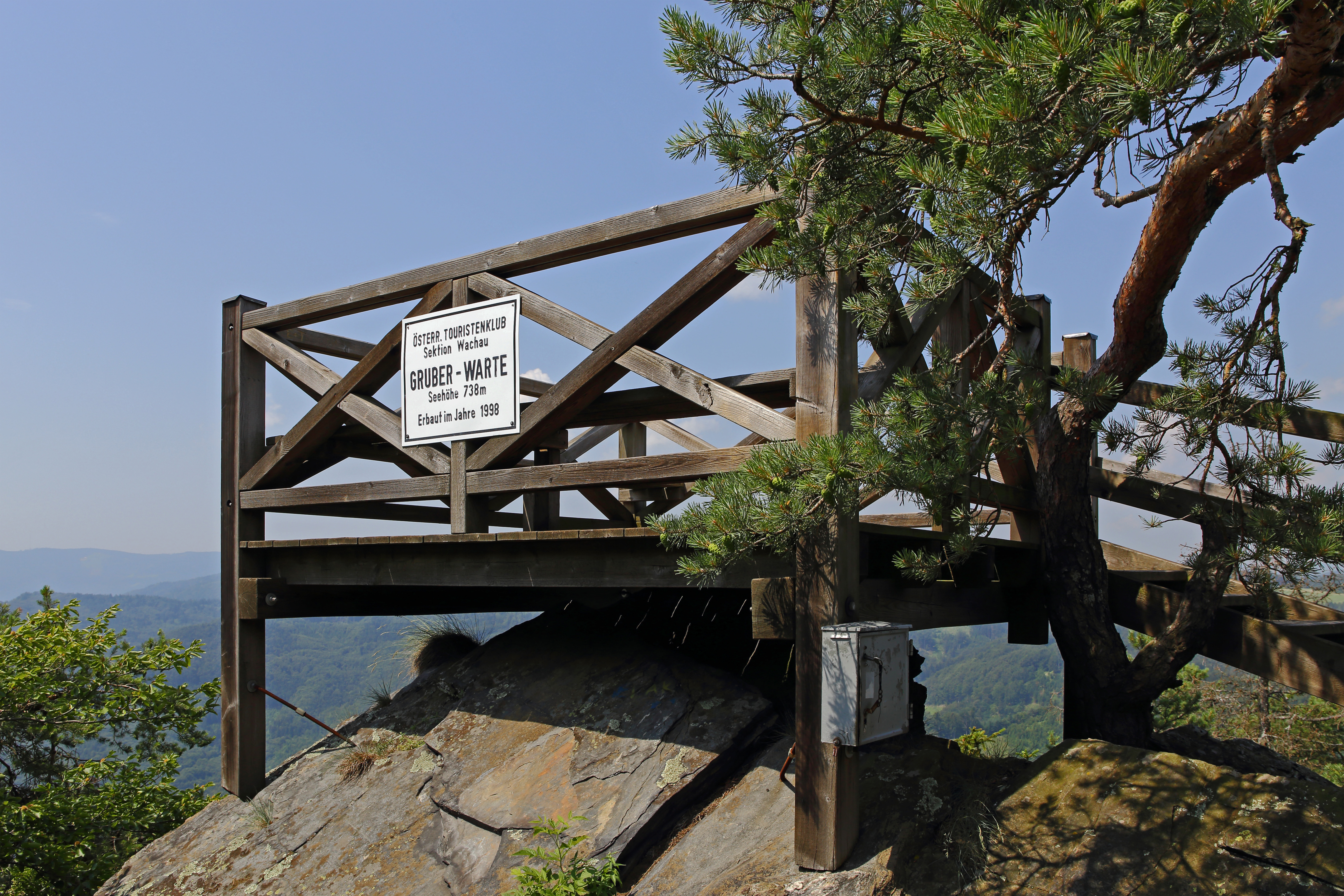 Die Gruberwarte befindet sich westlich von Weißenkirchen in der Wachau unterhalb des Gipfels der Buschandlwand. Die nach dem Komponisten Josef Gruber benannte Warte wurde 1998 errichtet und befindet sich auf 738 m Höhe.